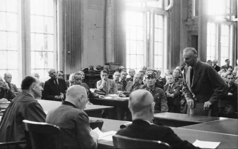 Volksgerichtshof, Dr.Carl Goerdeler Prozess 20. Juli 1944 Carl Goerdeler, Dr. Abgebildete Personen: Goerdeler, Carl Friedrich Dr.: Oberbürgermeister von Leipzig, Prozeß 20. Juli 1944, Deutschland